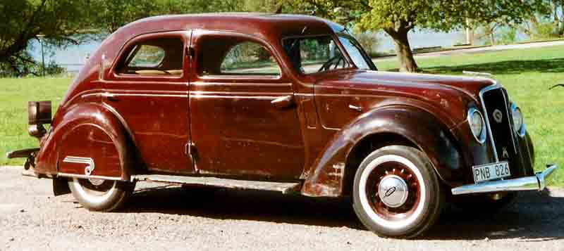 Volvo PV36 Carioca 4-Door Sedan 1935